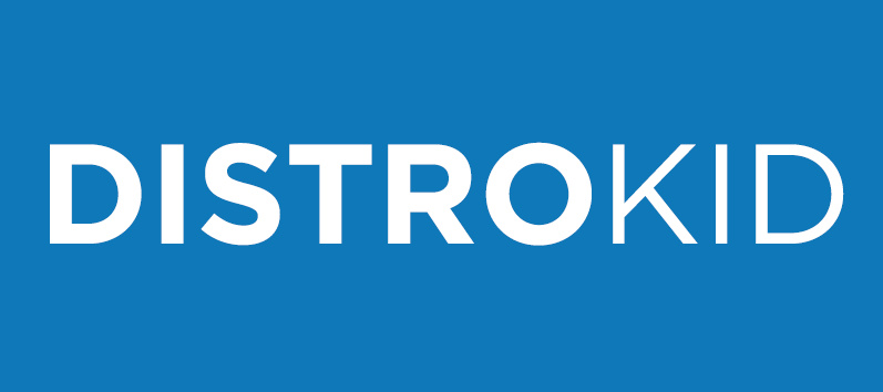 Logo de DistroKid